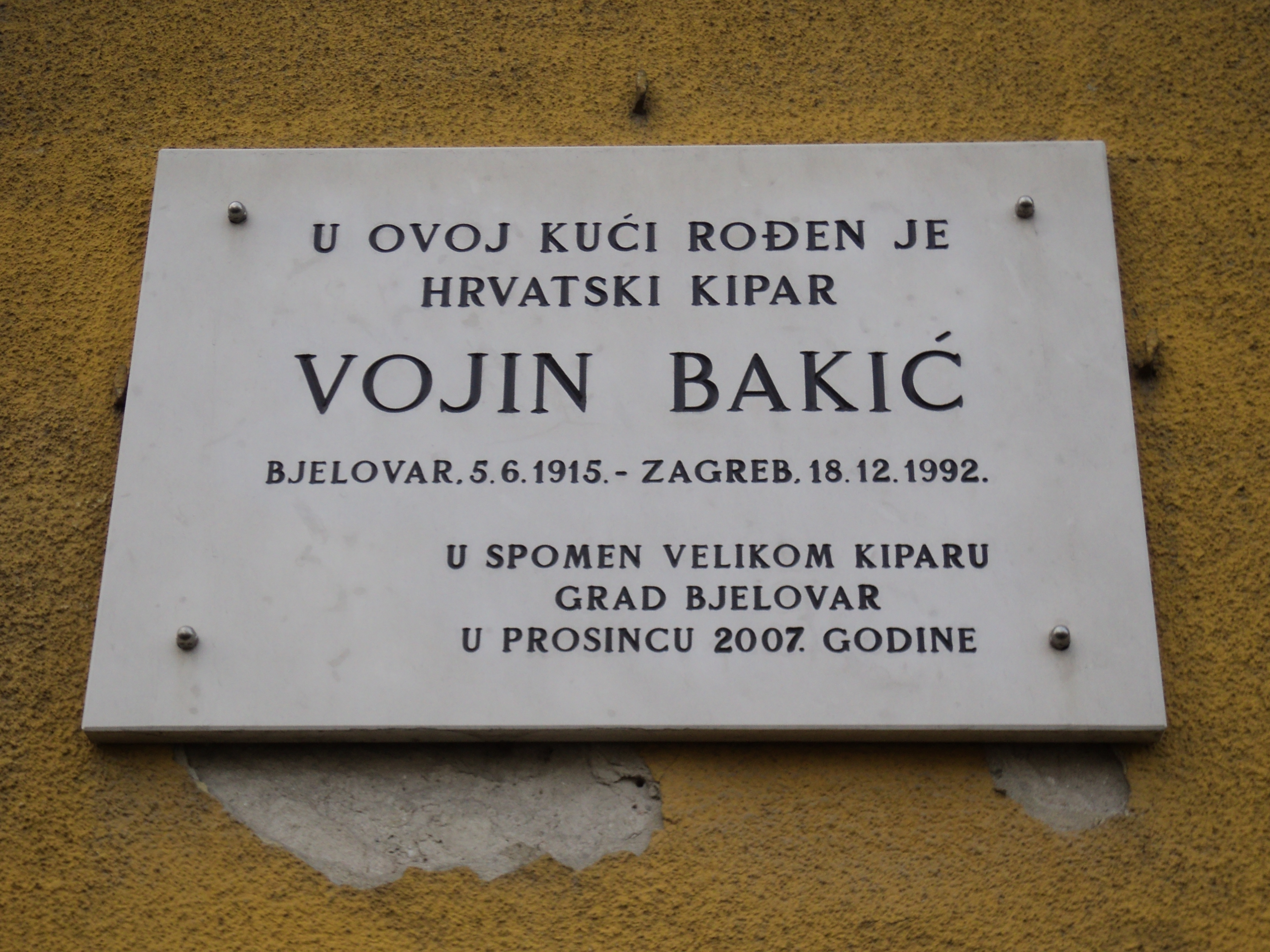 Spomen-ploča na rodnoj kući vajara Vojina Bakića u Bjelovaru. Self-made. Decembar 2010.